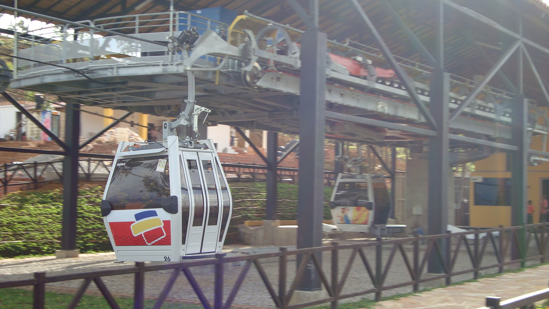 Estacion los Santos